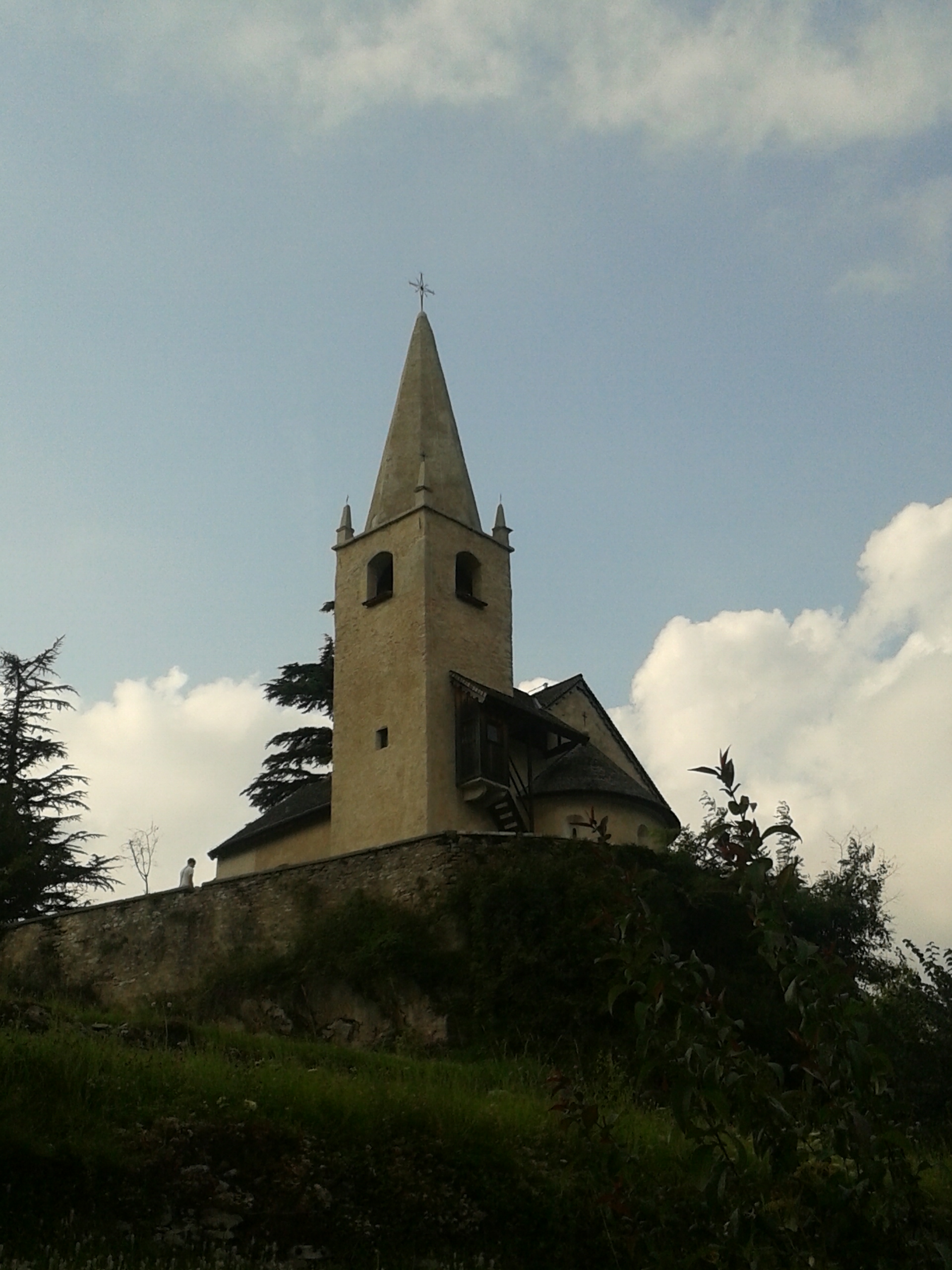 Chiesa di Sant'Ippolito a Castello Tesino Licensing